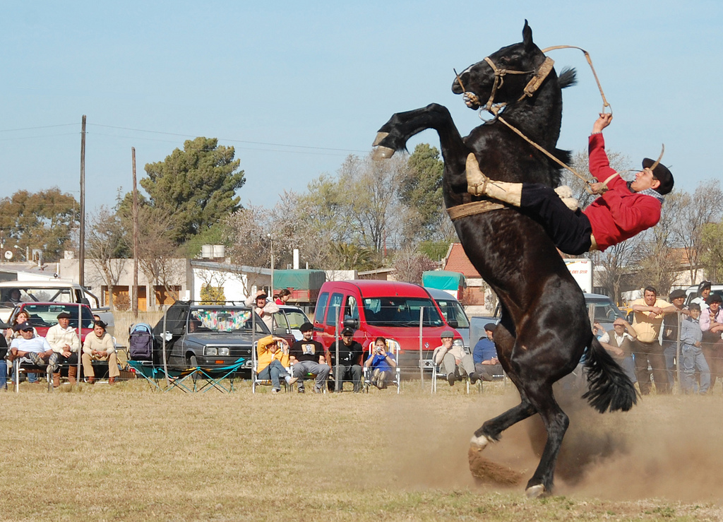 jinete jineteada doma